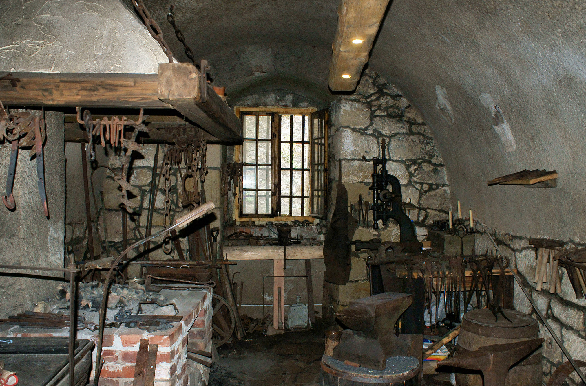 Kłodzko, twierdza Główna Kłodzko, 2 poł. XVIII, XIX (zabytek nr 691 z 10.05.1960)